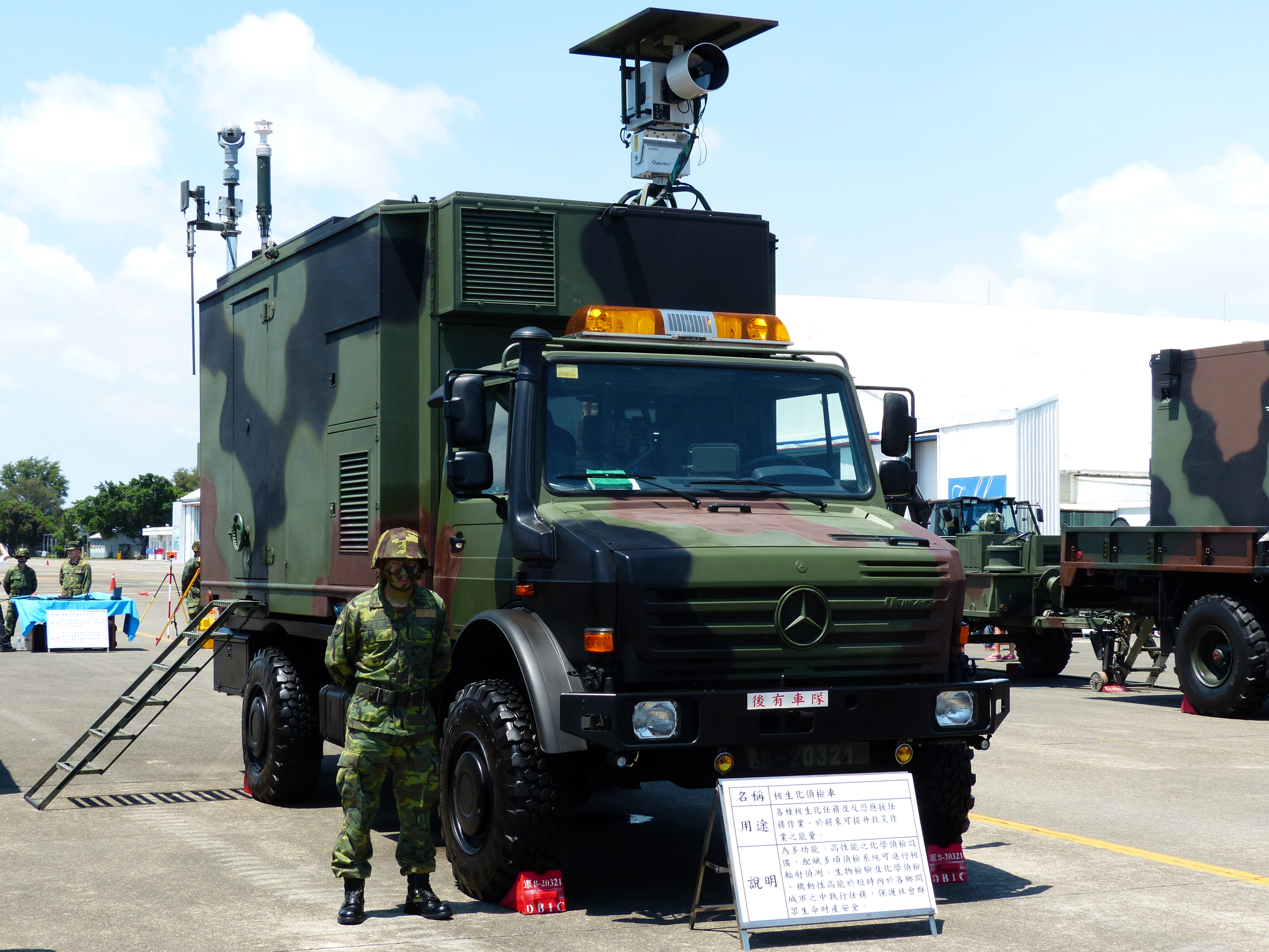 2013年臺北護專空軍基地營區開會活動，停機坪展示之陸軍97式核生化偵檢車。